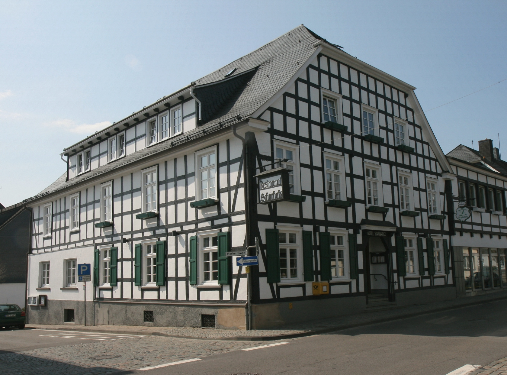 Haus Schürholz in Drolshagen. This image shows a heritage building in Germany, located in the North Rhine-Westphalian city Drolshagen (no. 6).